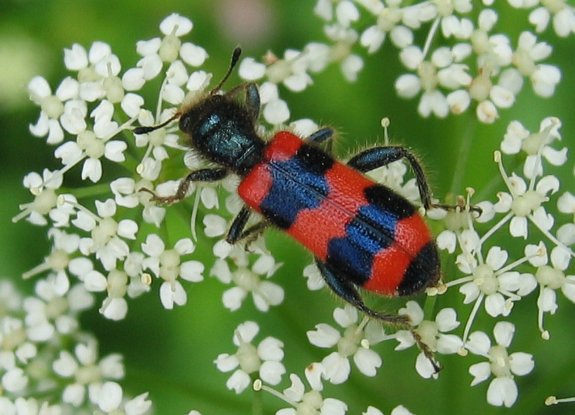 Trichodes apiarius, Rettenbach, Upper Austria, Austria